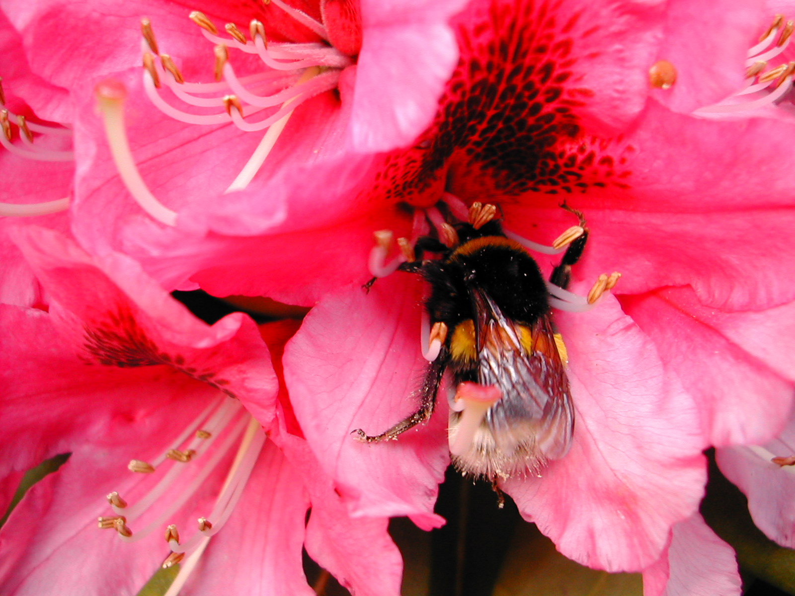 pollinisation d'une fleur par un insecte